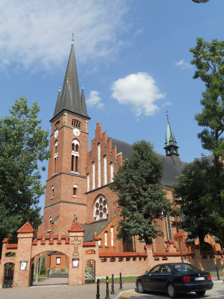 Kościół św. Marii Magdeleny w Rabce-Zdroju przy ulicy Orkana 8.